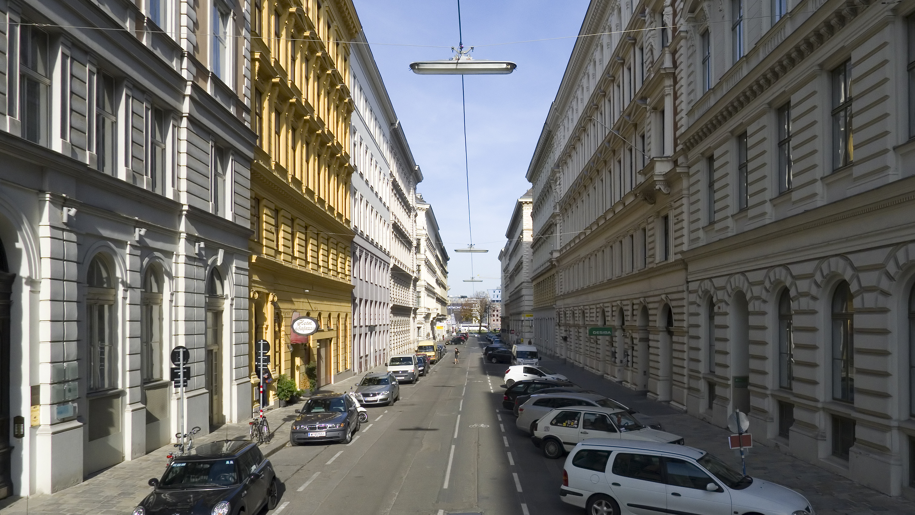 Esslinggasse in Wien 1 bei Nr. 6 Richtung Nordosten